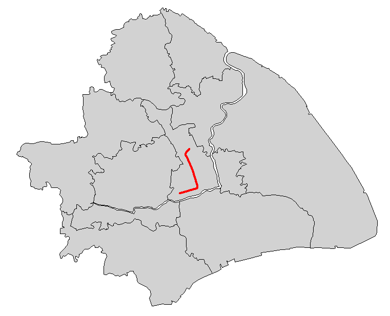 上海轨道交通5号线简图 本地图的底图不表示上海市全部所辖区域 因版面关系，上海市所辖之崇明岛、长兴岛等与本线路无关的离岛未在本图中表示。